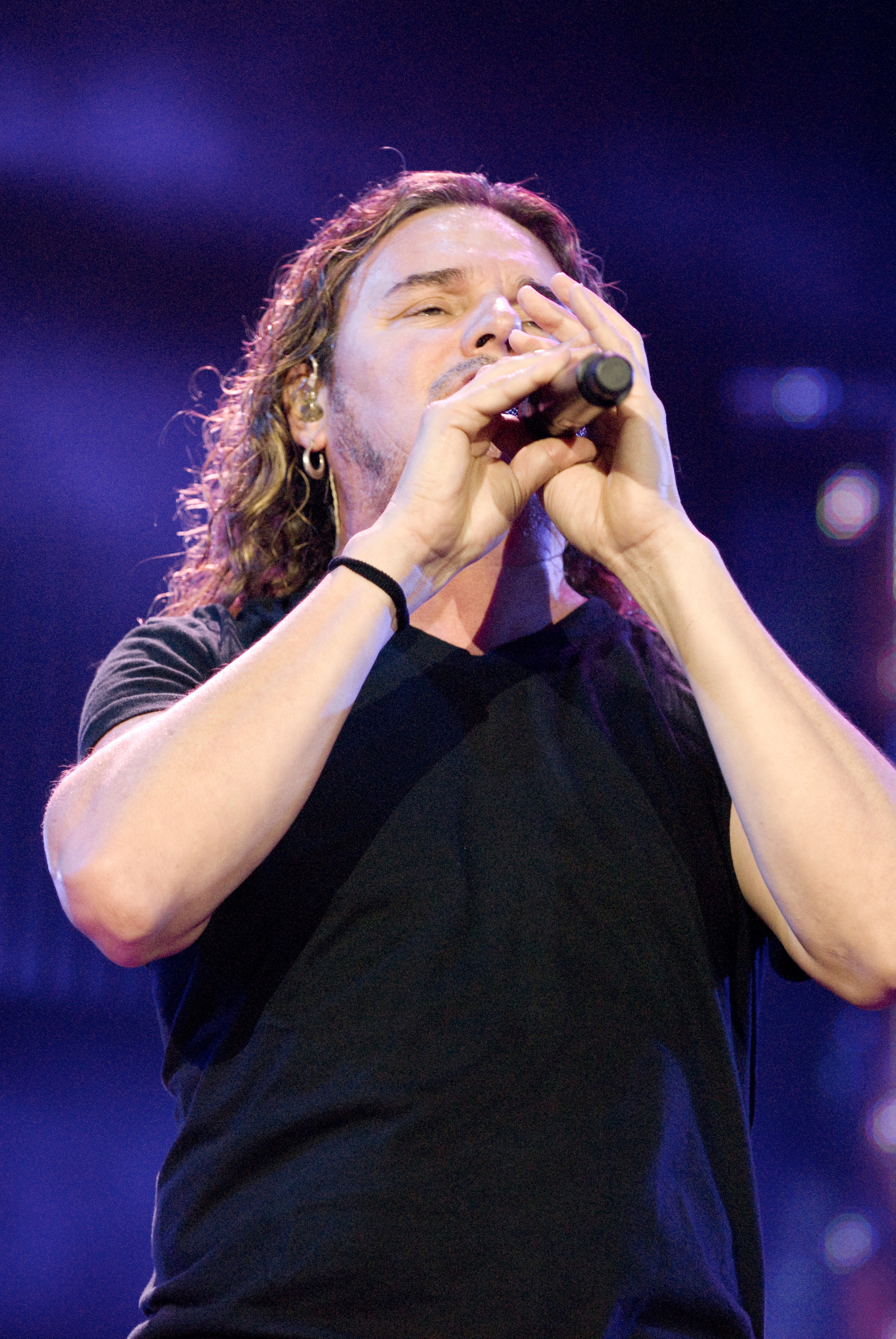 Maná